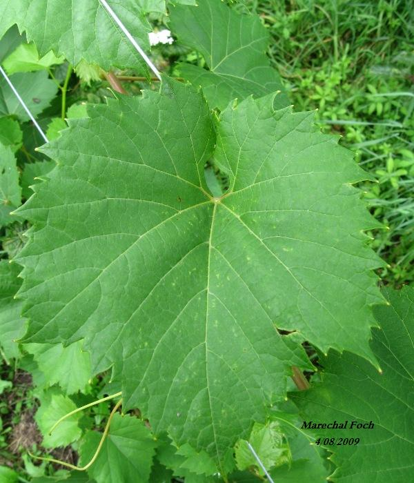 Maréchal Foch (cépage) - liść - 4/08/2009